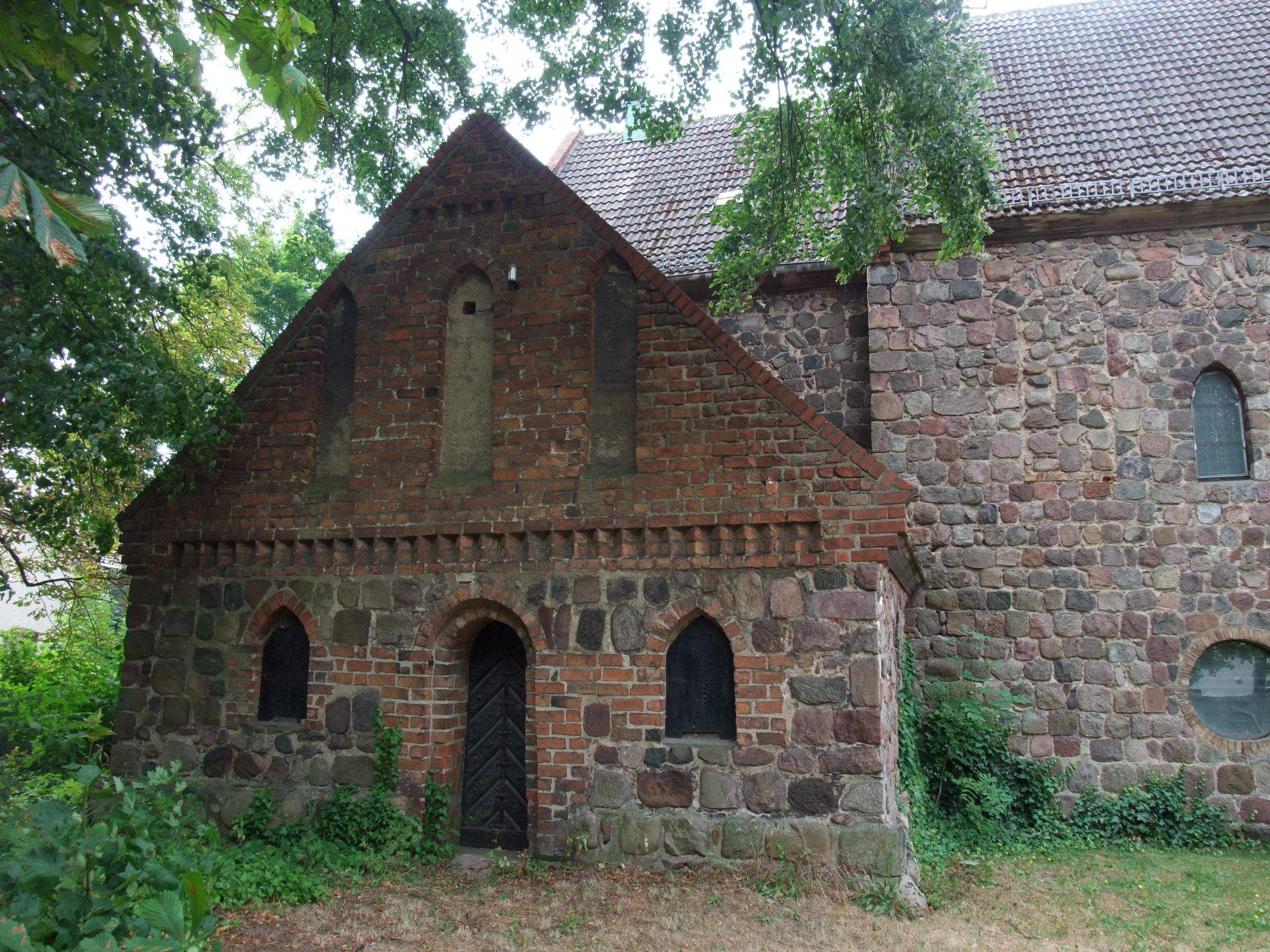 Kirche in Lindenberg (Barnim), Deutschland.